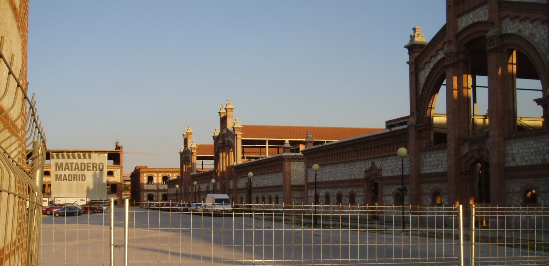 Panorámica del antiguo Matadero de Madrid. Arganzuela. Madrid. España.